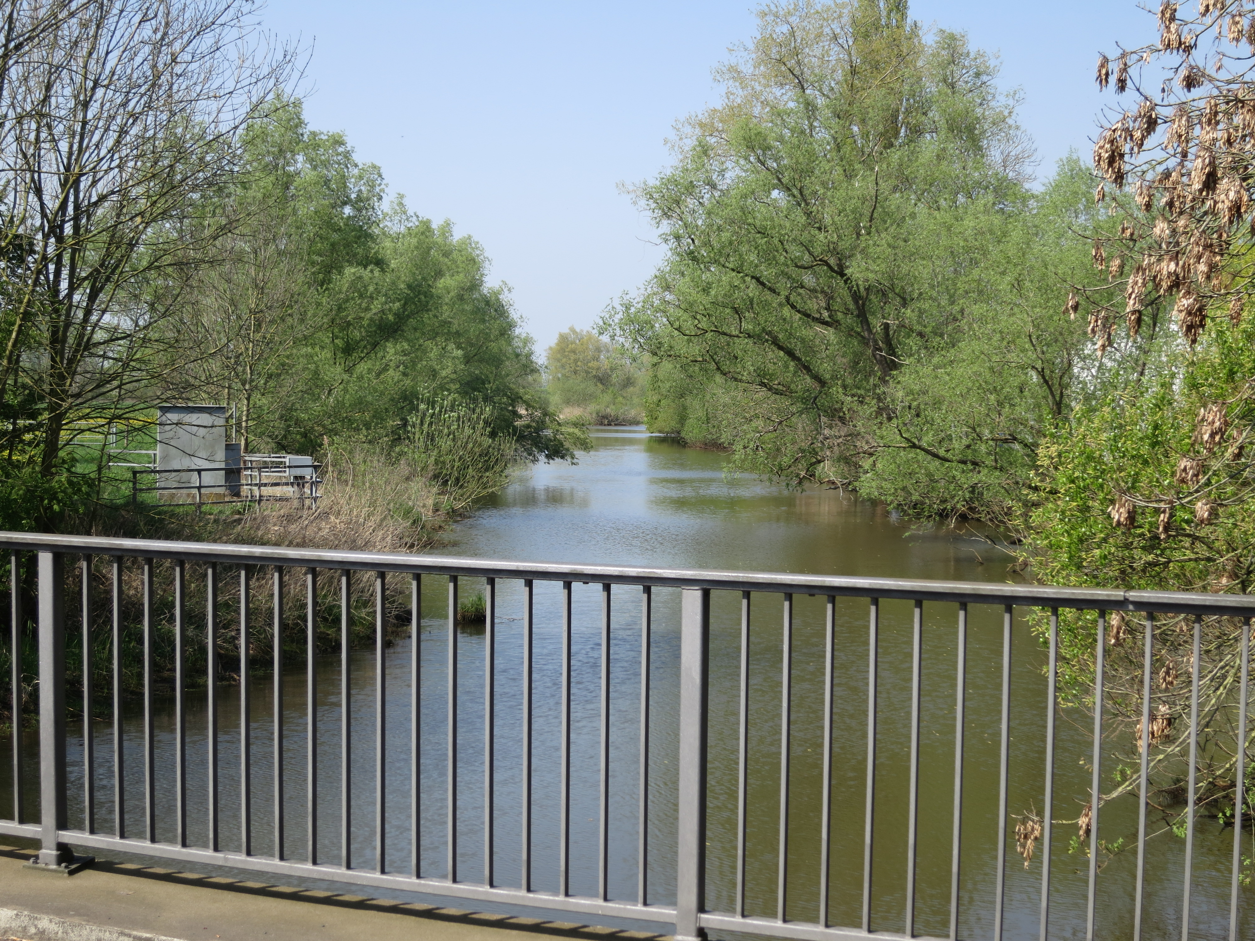 Die Ochtum in Bremen-Strom; Blick in Fließrichtung